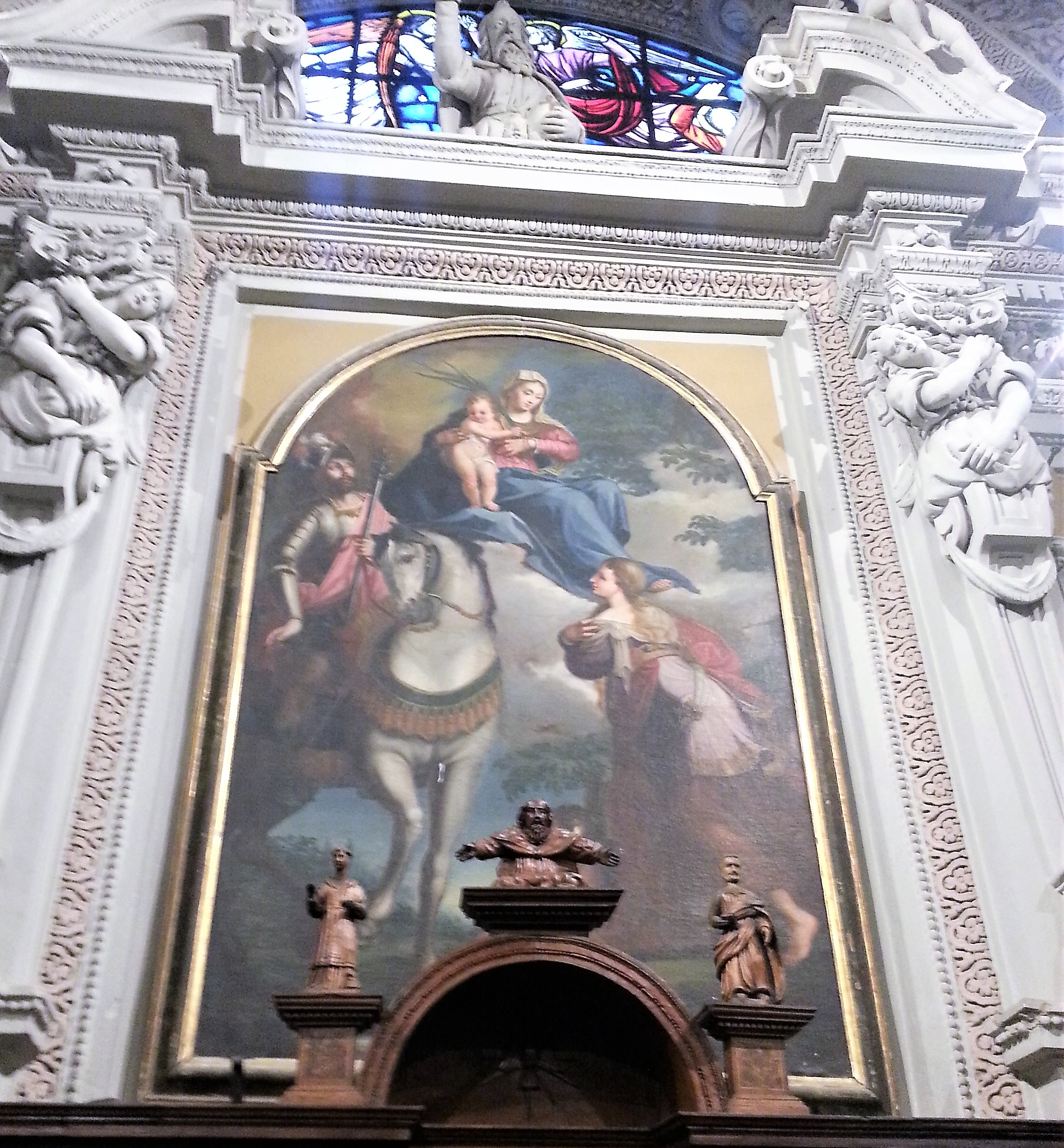 Pala d'latare attribuita a Alessandro Oliverio